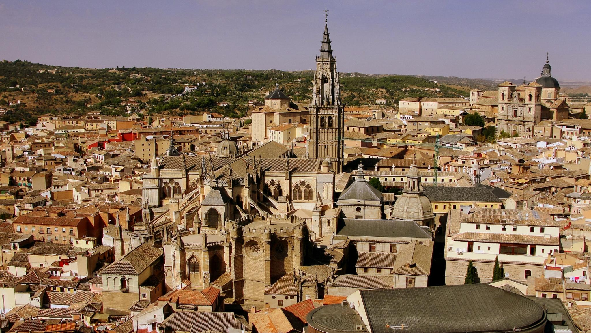 Catedral Primada e iglesia de San Ildefonso. Toledo, España.